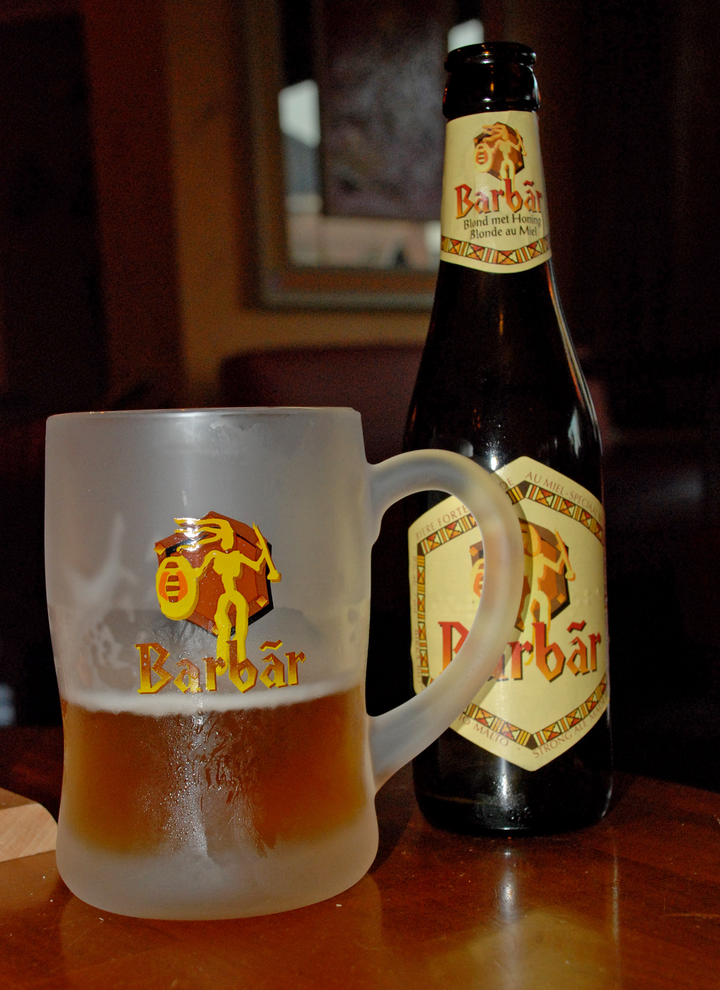 Barbar, Belgian beer